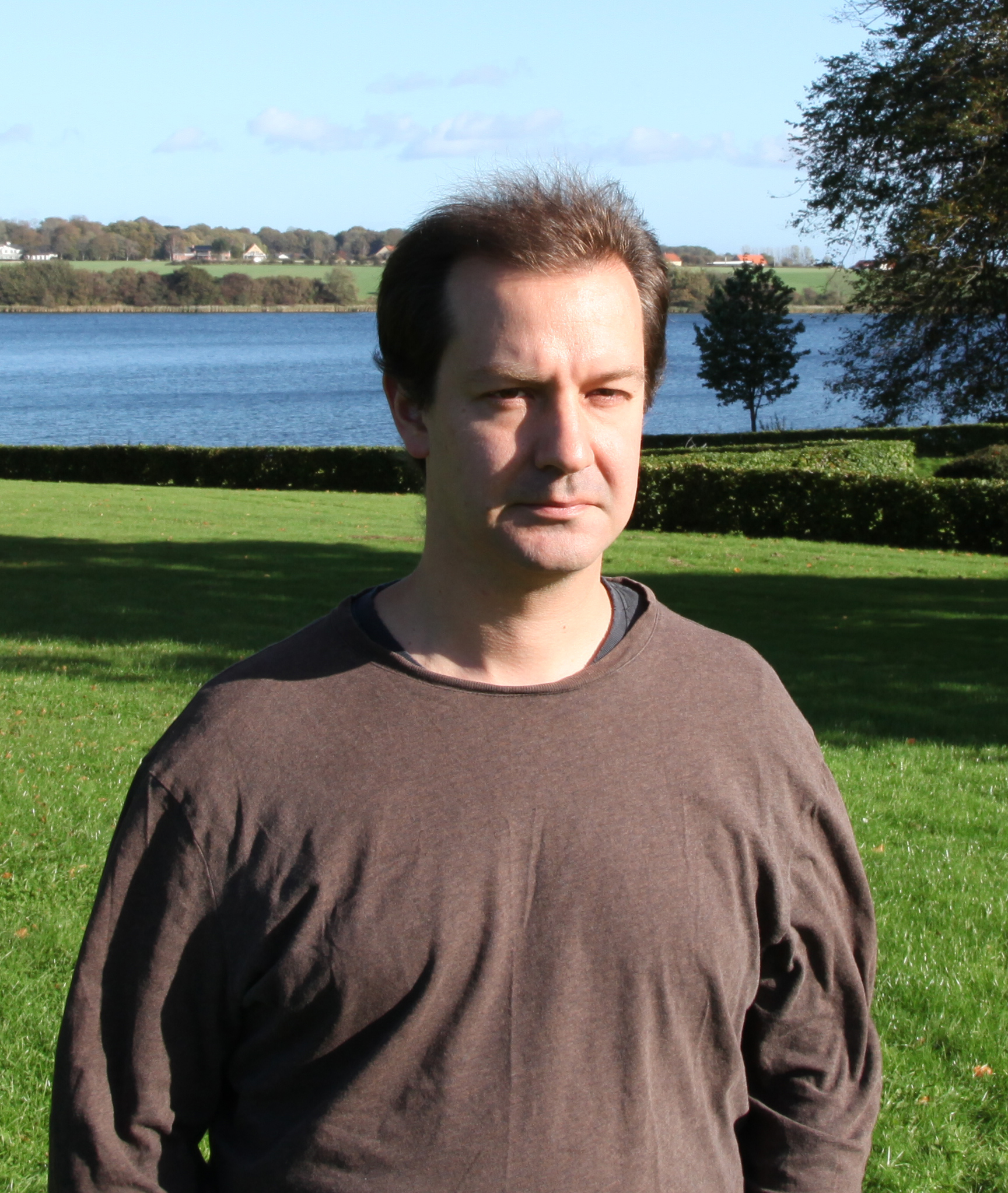 Danny Calegari i Sandbjerg, 2011